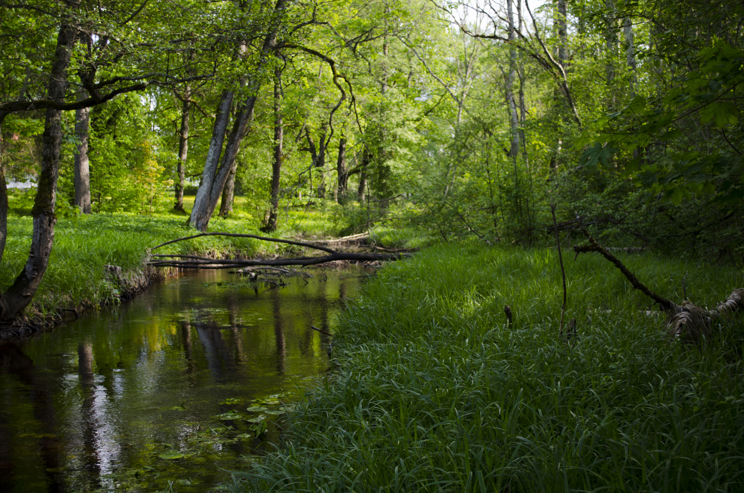 Harmi mõisa park